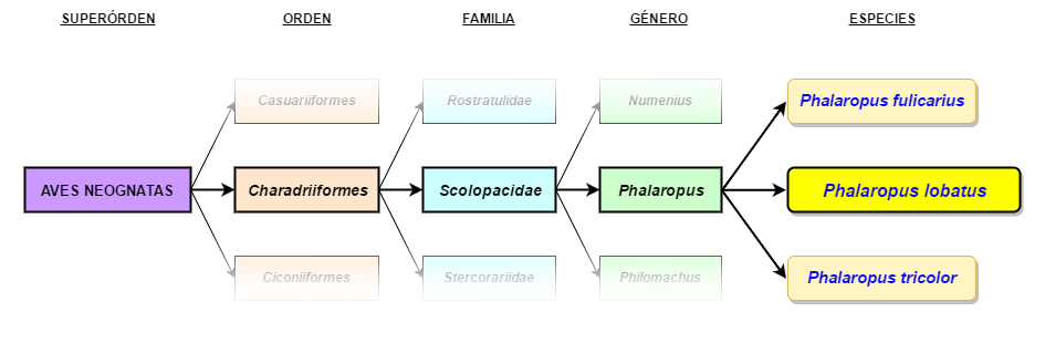 Taxonomía Phalaropus lobatus